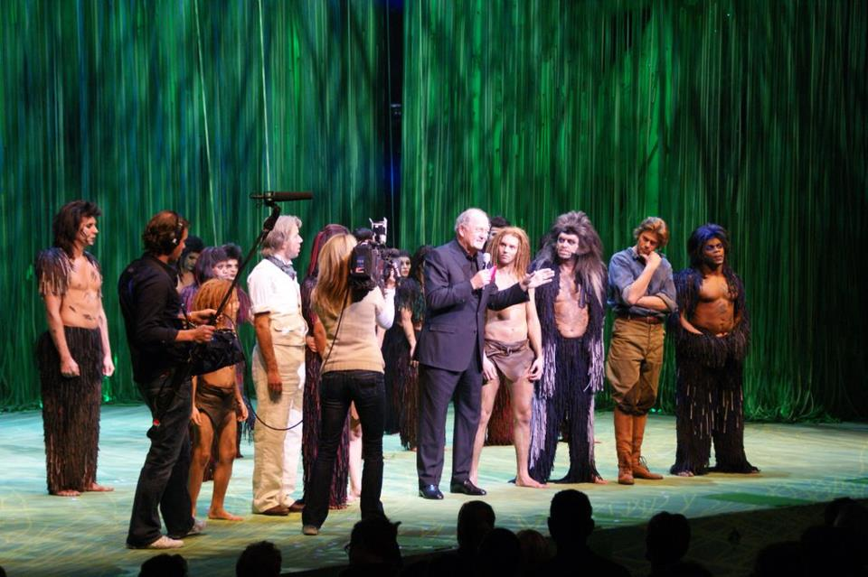 Peter de Kroon, Tarzan de Musical Opnames met Joop van den Ende